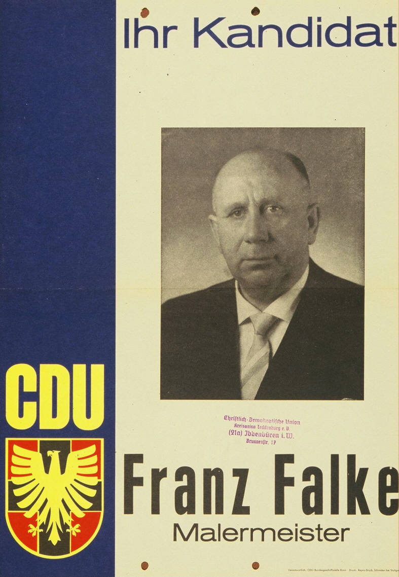 Ihr Kandidat Franz Falke MalermeisterAbbildung:PorträtfotoKommentar:versehen mit Stempel der CDU Kreisunion Tecklenburg e.V. (Adresse)Plakatart:Kandidaten-/Personenplakat mit PorträtAuftraggeber:Verantw.: CDU-Bundesgeschäftsstelle BonnDrucker_Druckart_Druckort:Repro-Druck, Schmiden bei StuttgartObjekt-Signatur:10-001: 1080Bestand:Plakate zu Bundestagswahlen (10-001)GliederungBestand10-18:Plakate zu Bundestagswahlen (10-001) » Die 4. Bundestagswahl am 17. September 1961 » CDU » Mit PorträtfotoLizenz:KAS/ACDP 10-001: 1080 CC-BY-SA 3.0 DE